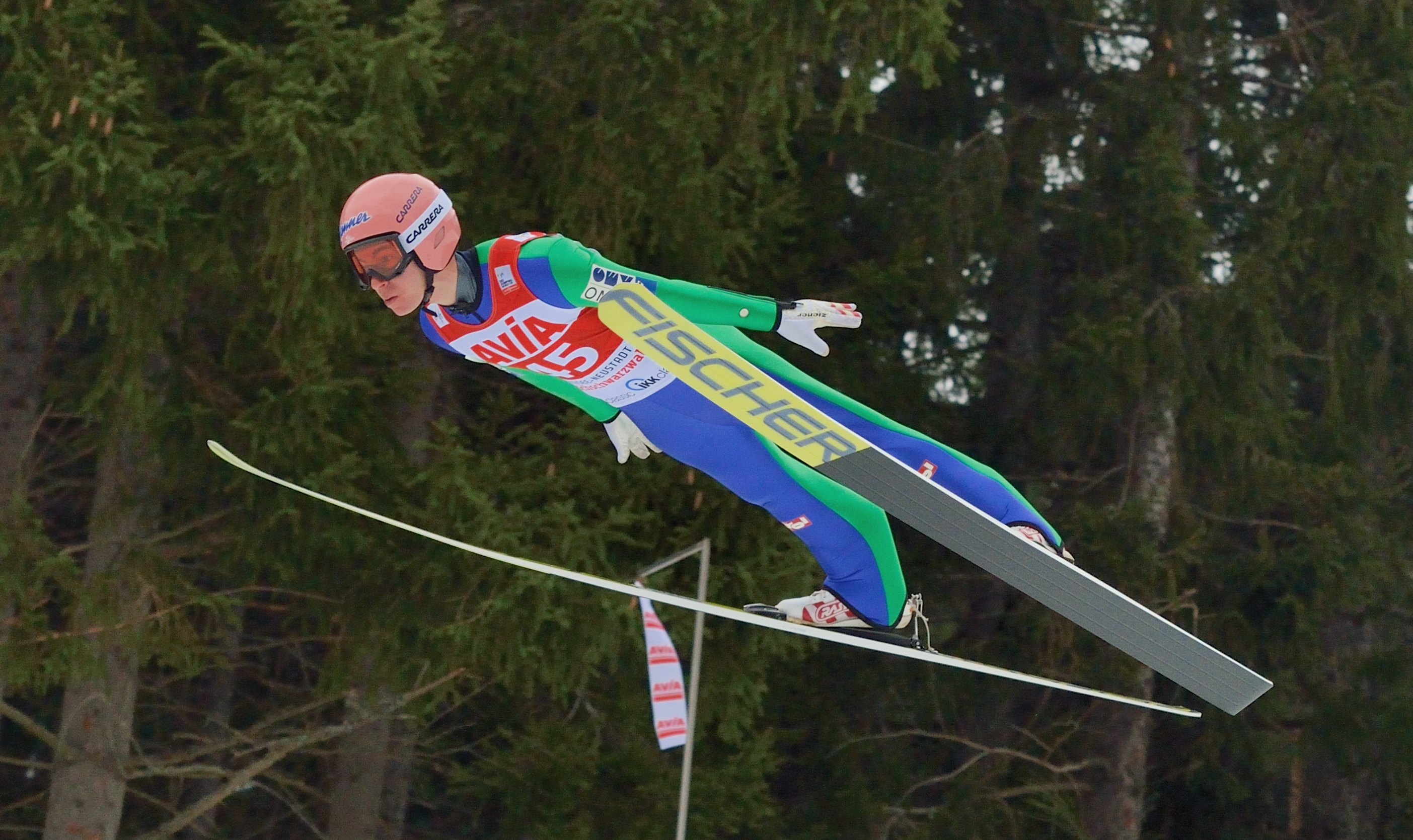 FIS Ski Weltcup Titisee-Neustadt 2016: Stefan Kraft